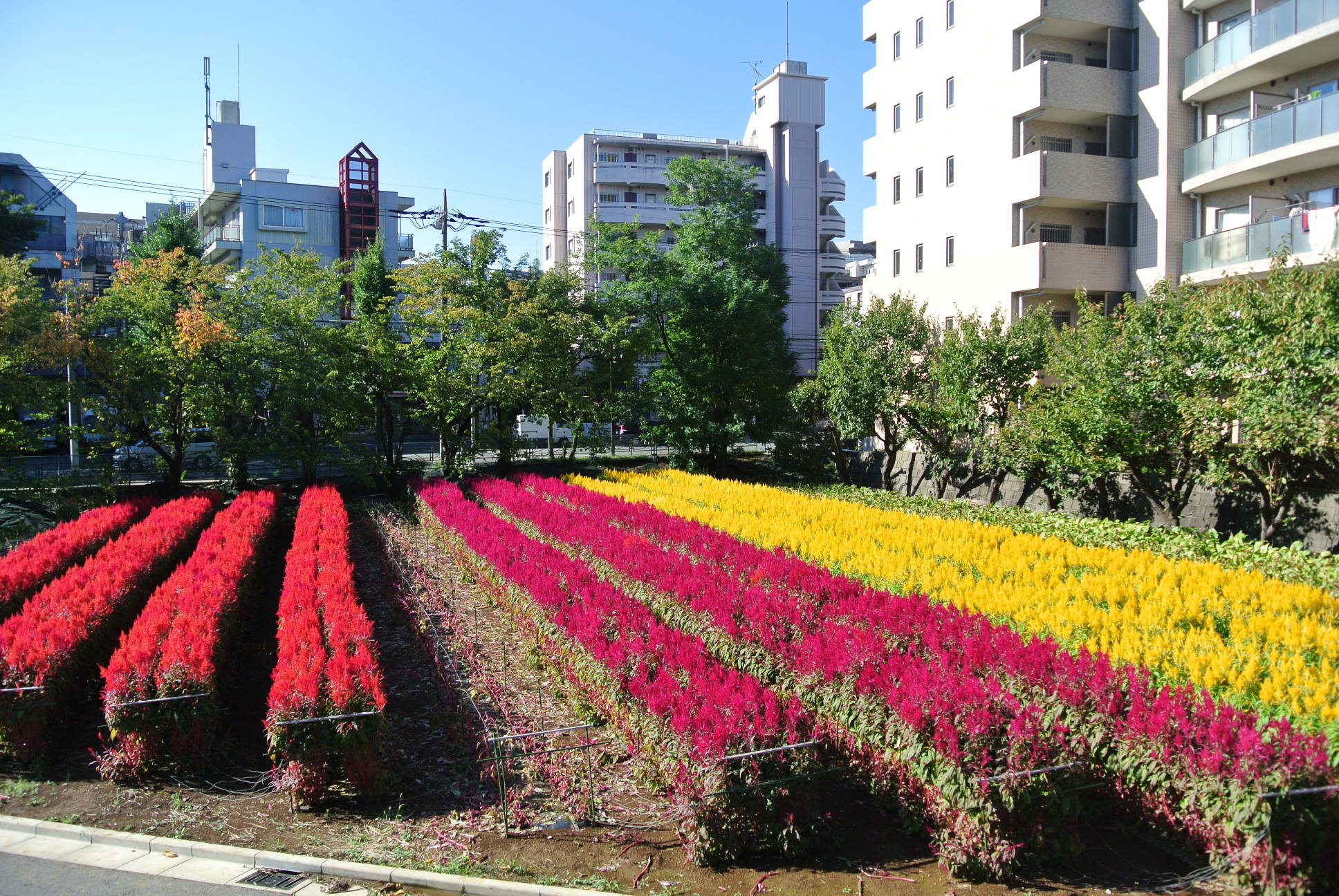 長坂下交差点・JAセレサ本店前